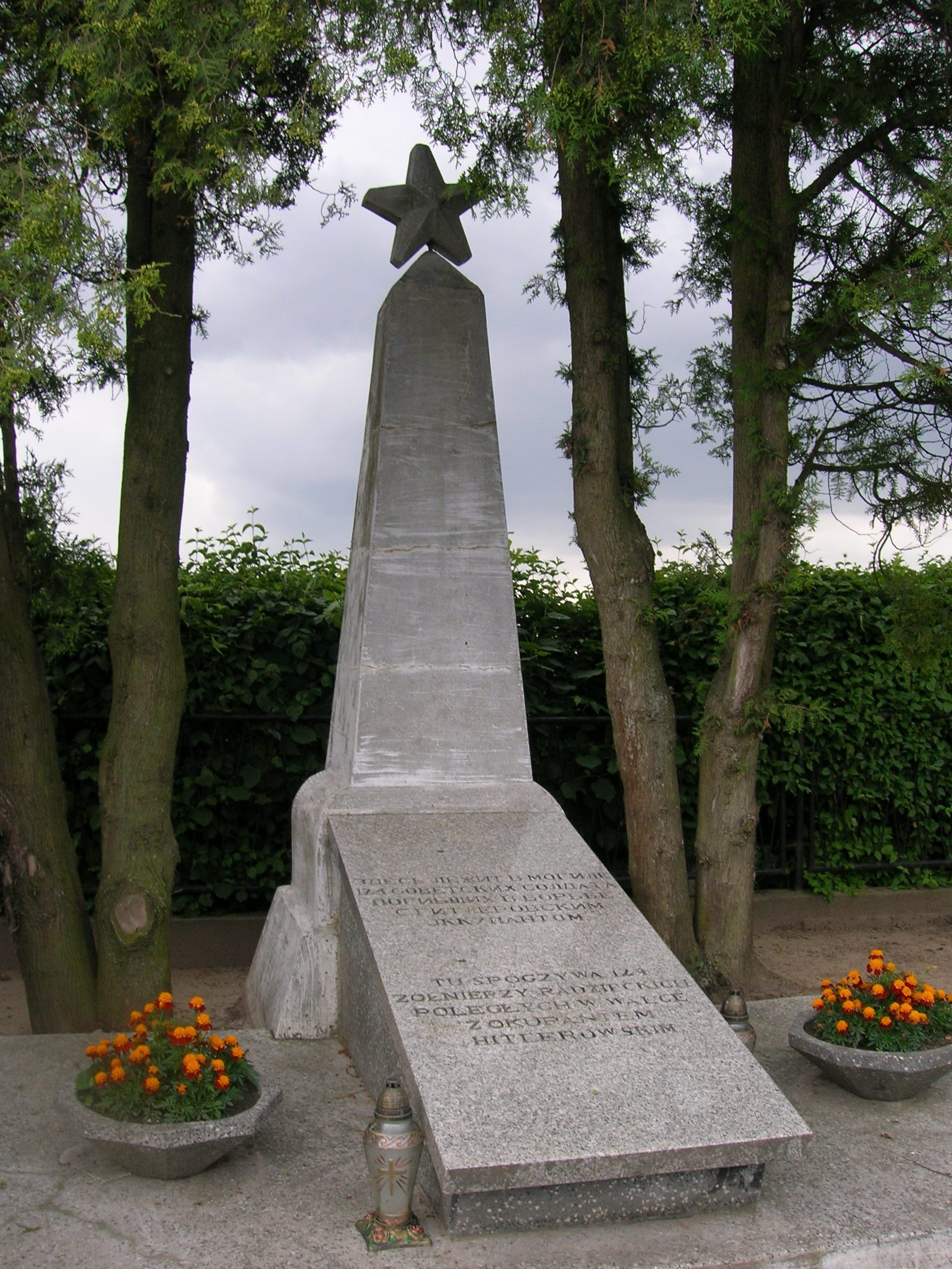 Cmentarz żołnierzy niemieckich i radzieckich poległych podczas walk o pomorze w końcowym etapie II wojny światowej w Mrzezinie.